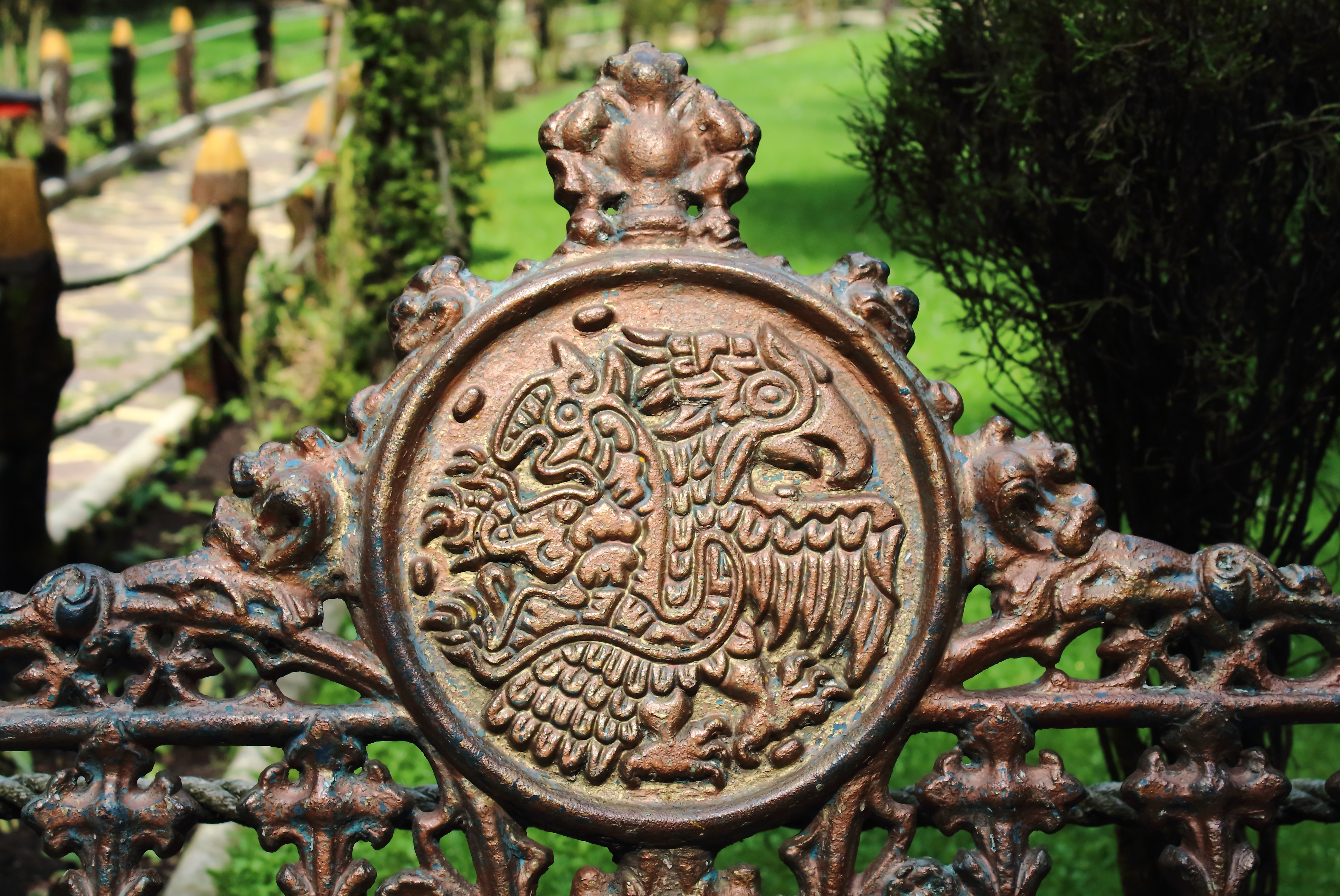 Escudo de un águila en una banca del restaurante "La escondida", Toluca, México.